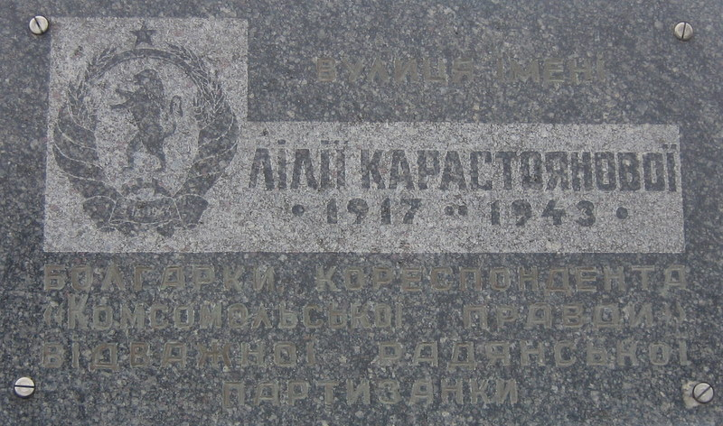 Пам'ятна дошка на вулиці Карастоянової